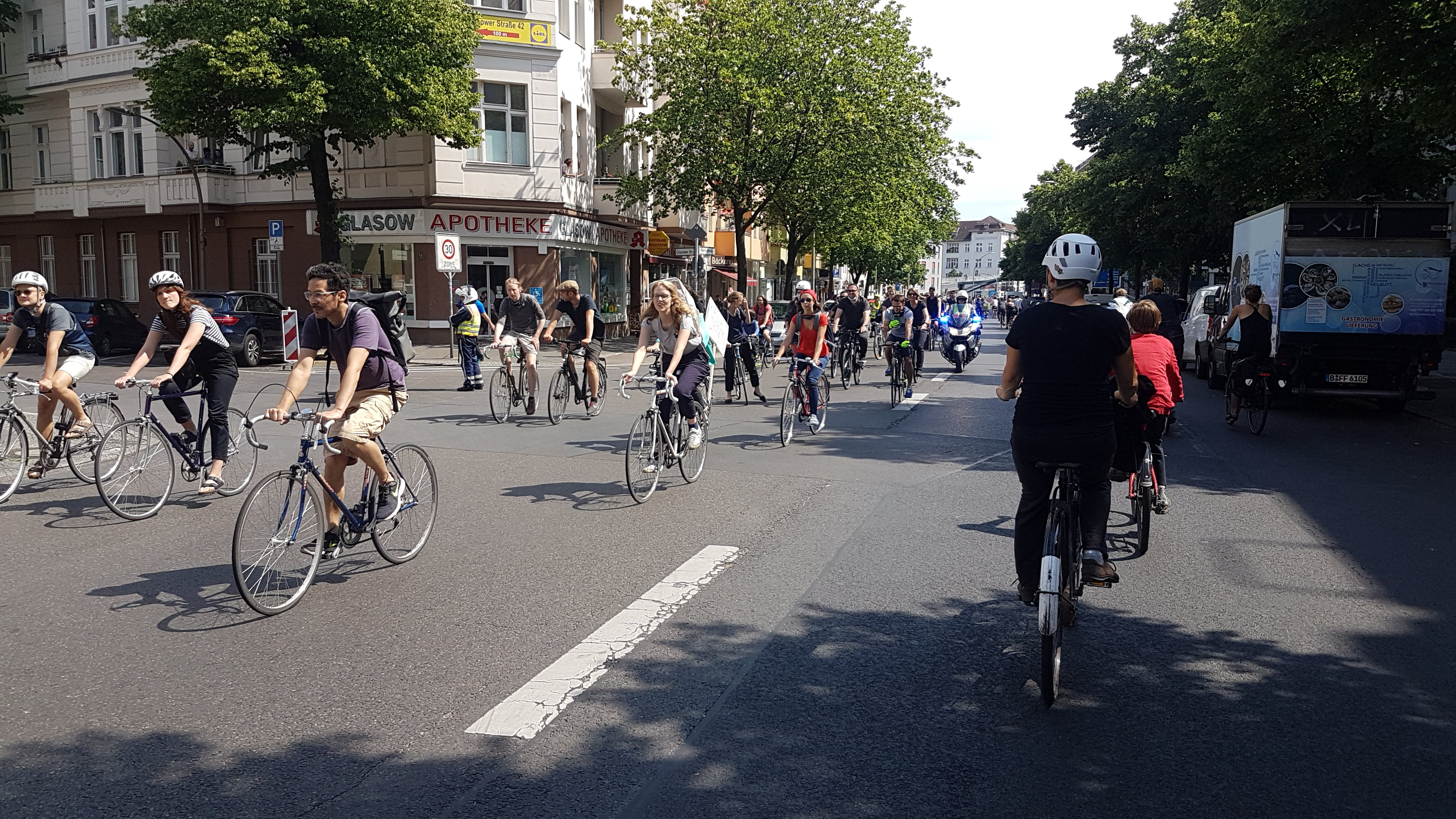 Demonstration für einen Radweg auf der Hermannstraße (Berlin)